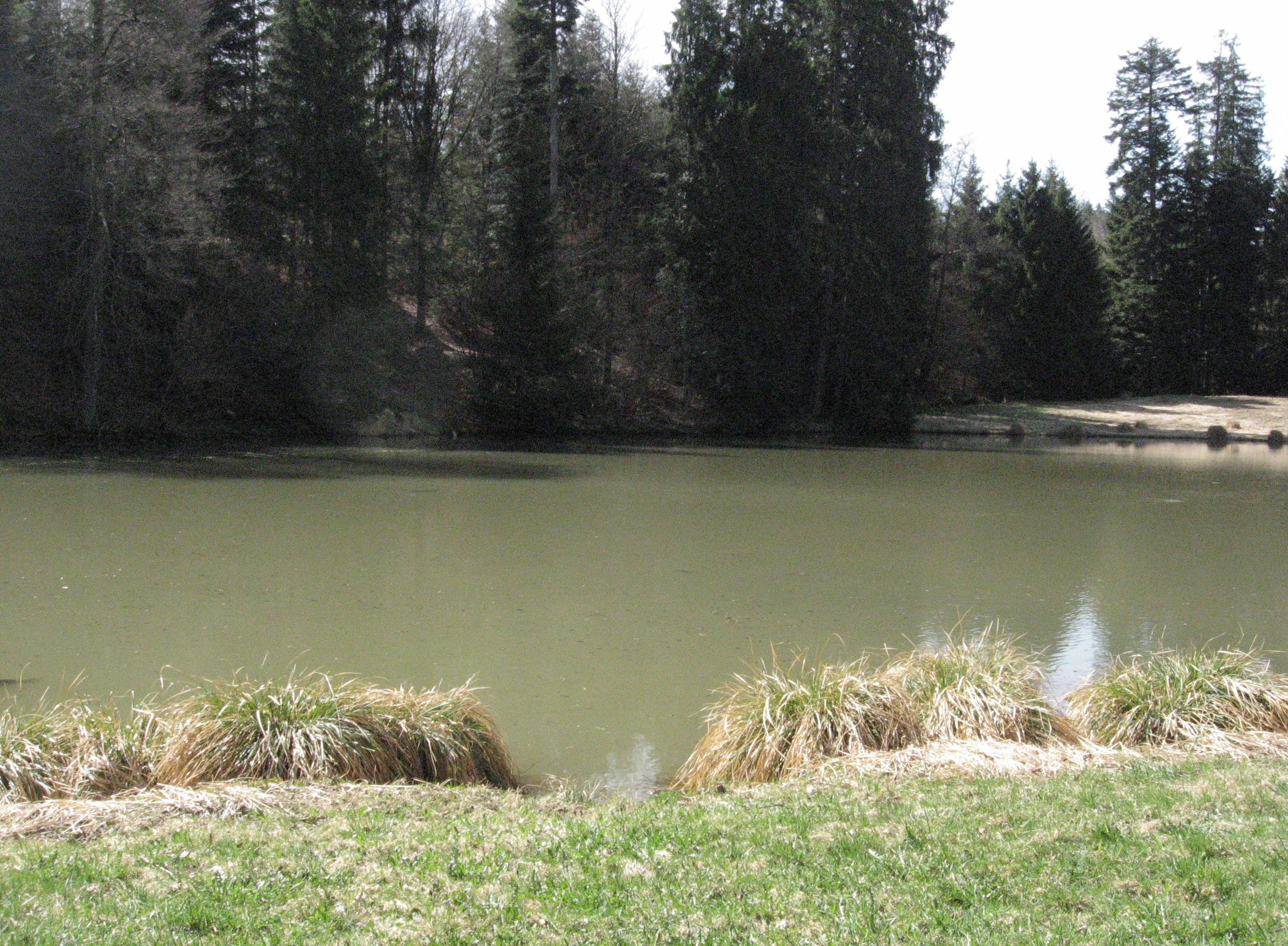 Der Mühlweiher an der Bühlerzeller Hambachsägmühle, vom Damm aus gesehen. Der See dient heute der Karpfenzucht und der Erholung.